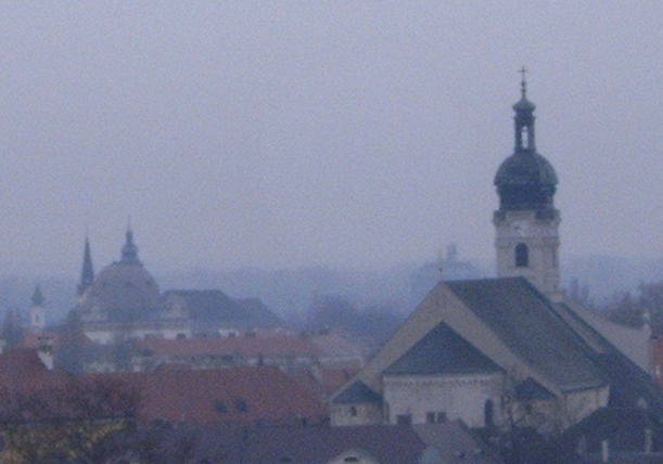 Győr: Újvárosi templomok és a bazilika (Győr-Moson-Sopron megye)